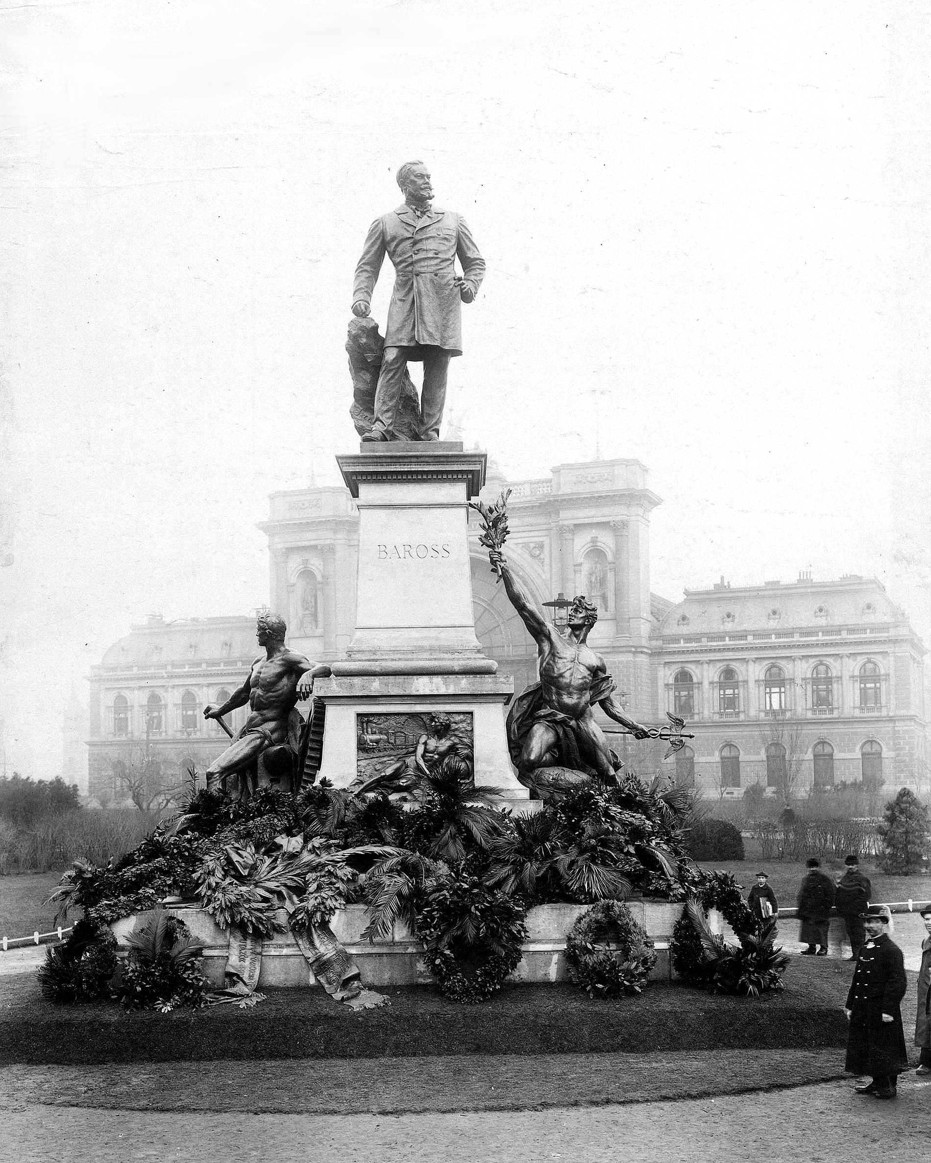 Baross Gábor szobra (Szécsi Antal alkotása, 1898.) a Keleti pályaudvar előtt. A felvétel 1898-ban készült. 1898-tól a 2-es metróvonal megépítéséig a Keleti pályaudvar előtt, 1971-től a pályaudvar északi oldala előtti kis parkocskában, a Thököly úthoz közel, a postahivatal előtt állt. 2013 december elején visszahelyezték a nevét viselő térre. A szobor egy 825 cm magas kőtalpazaton áll, rajta bronz koszorú és 2 dombormű. Elöl a vasút géniusza, hátlapon a vaskapu, 500 cm magas bronz férfialak. Mellékalakok: Kereskedelem és Ipar allegorikus alakjai (modellje Réthy Menotti atléta), 450 cm magas bronzból készült szobrok. Az öntés a Beschorner Rt. öntödéjében készült.